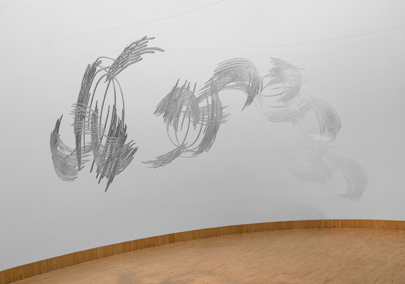 Ausstellungsansicht dreier Skulpturen: Space 1,2,3, 2013 im Esslmuseum 2014